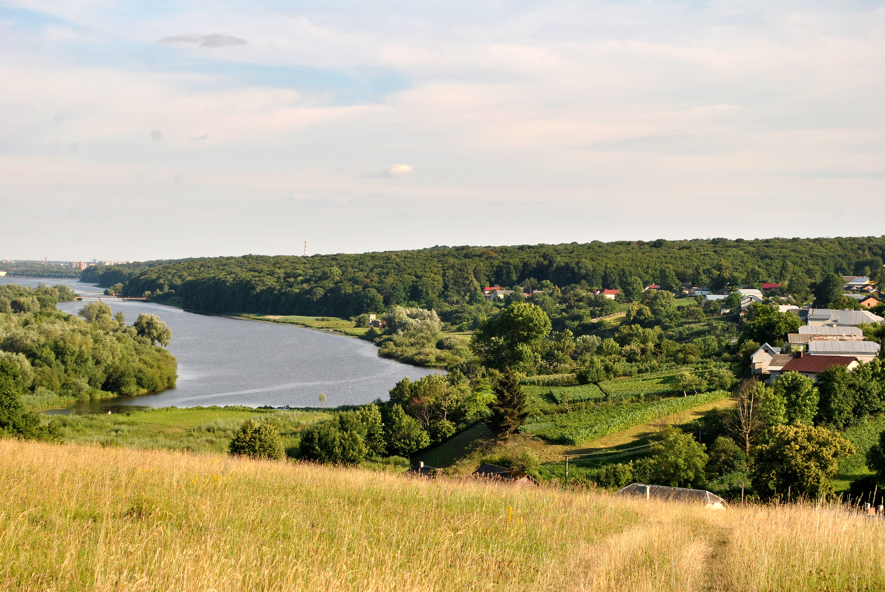 Регіональний ландшафтний парк «Загребелля»: лісове урочище «Пронятин» і веслувальний канал Тернопільського ставу.